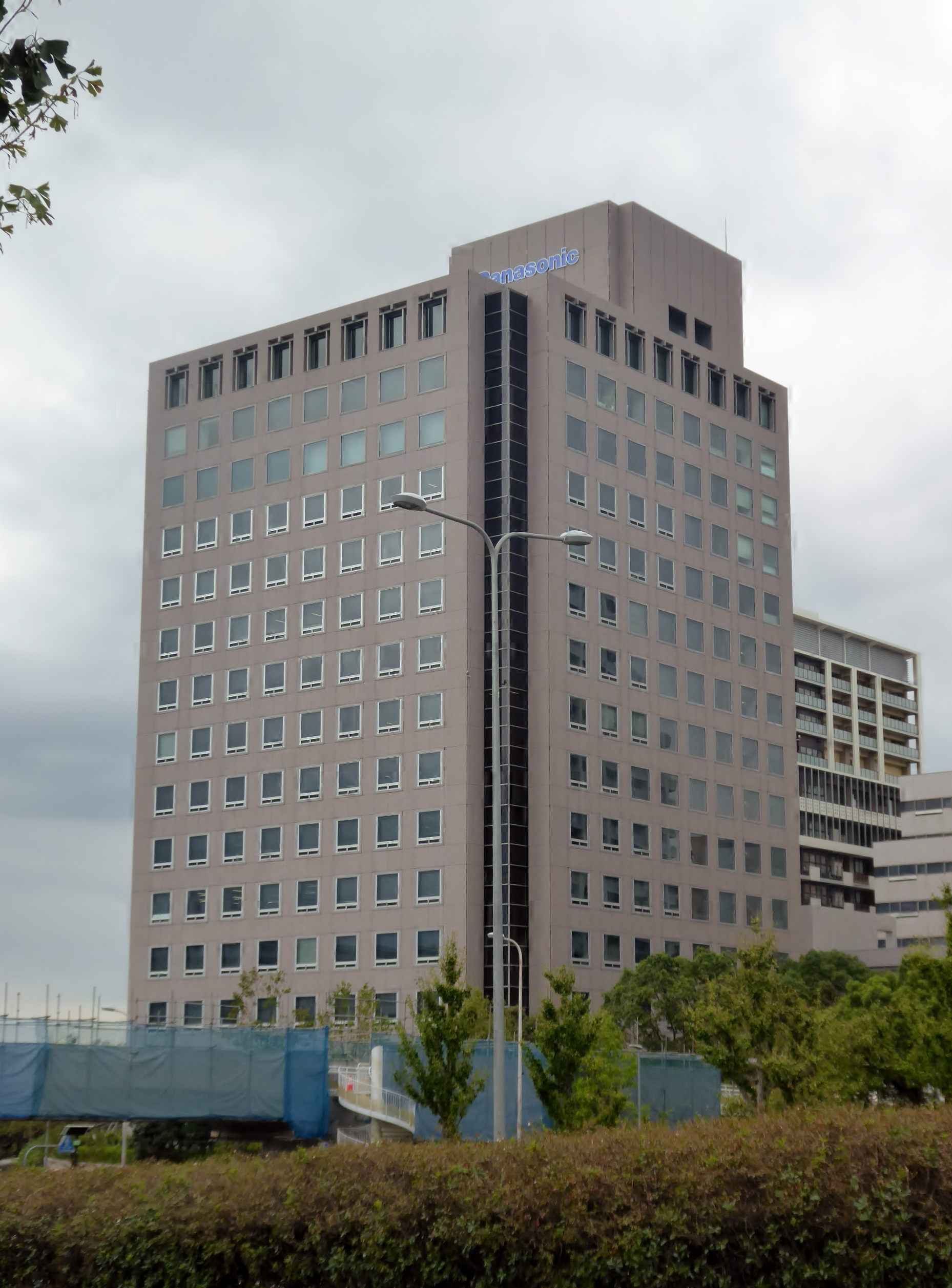 パナソニック ホームズ株式会社本社を撮影。